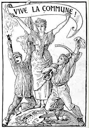 Vive la Commune!, The Commonweal, may 1887